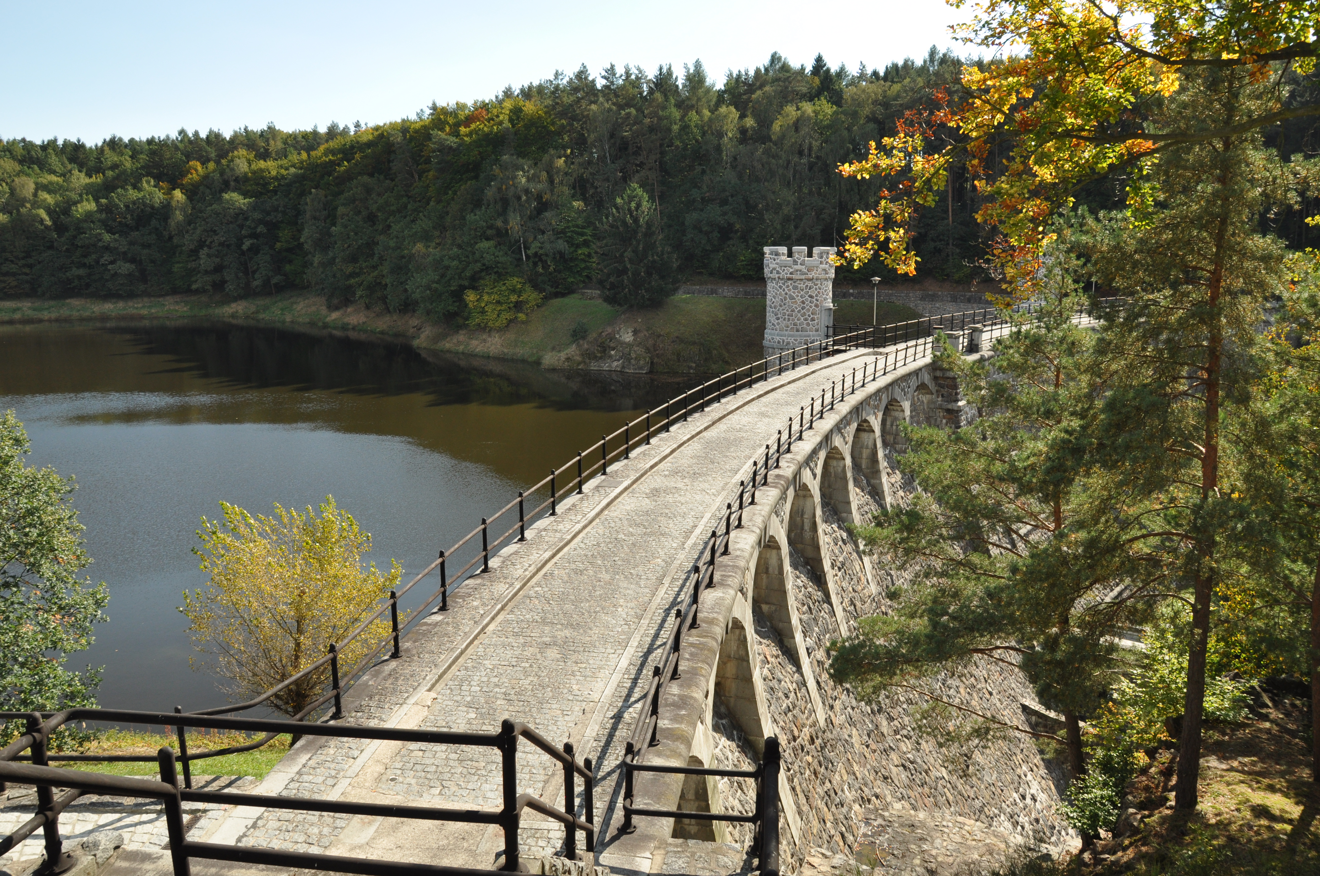 Pařížov_přehradní hráz